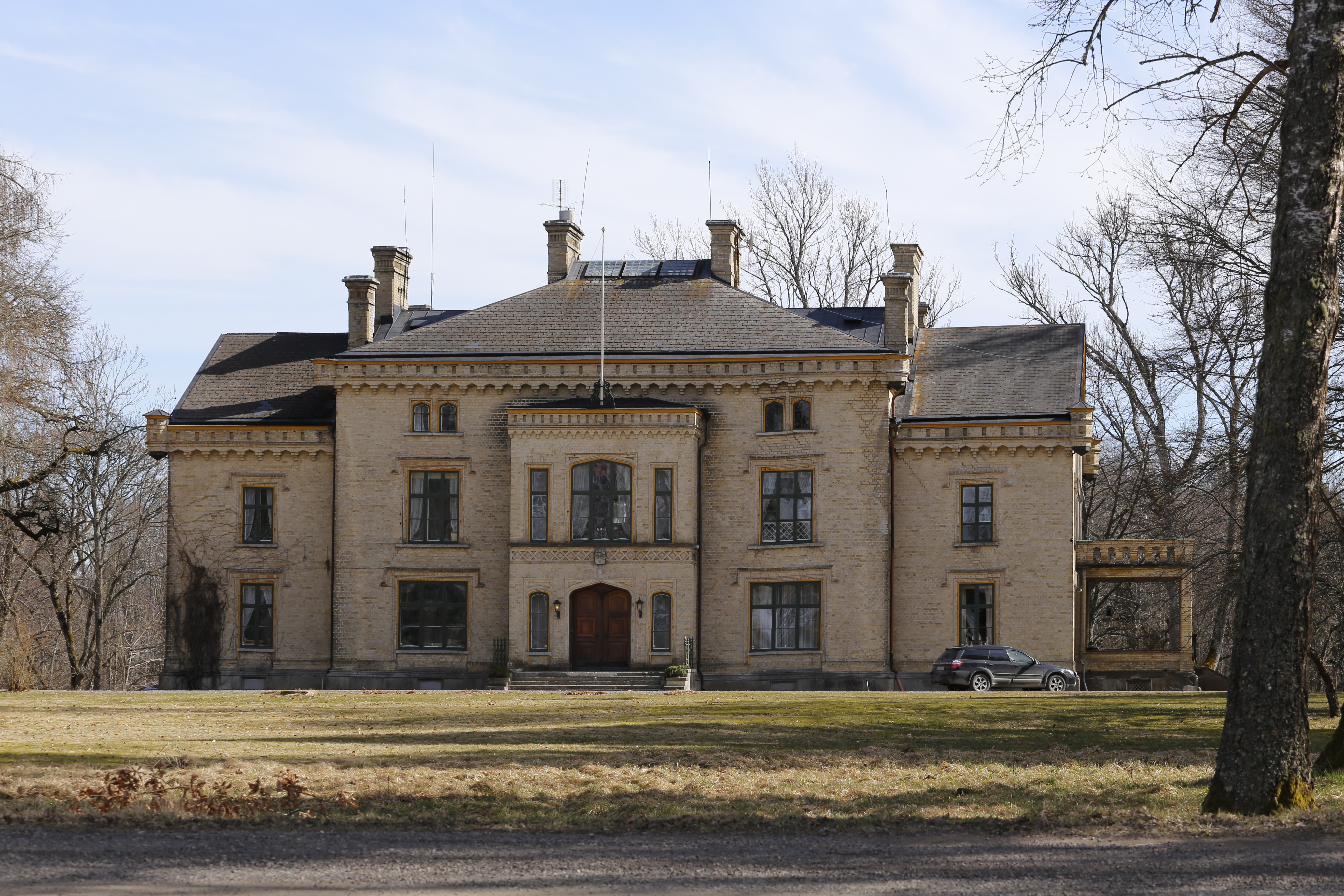 Höglunda herrgård (Höglunda 1:311 f.d. 1:51)